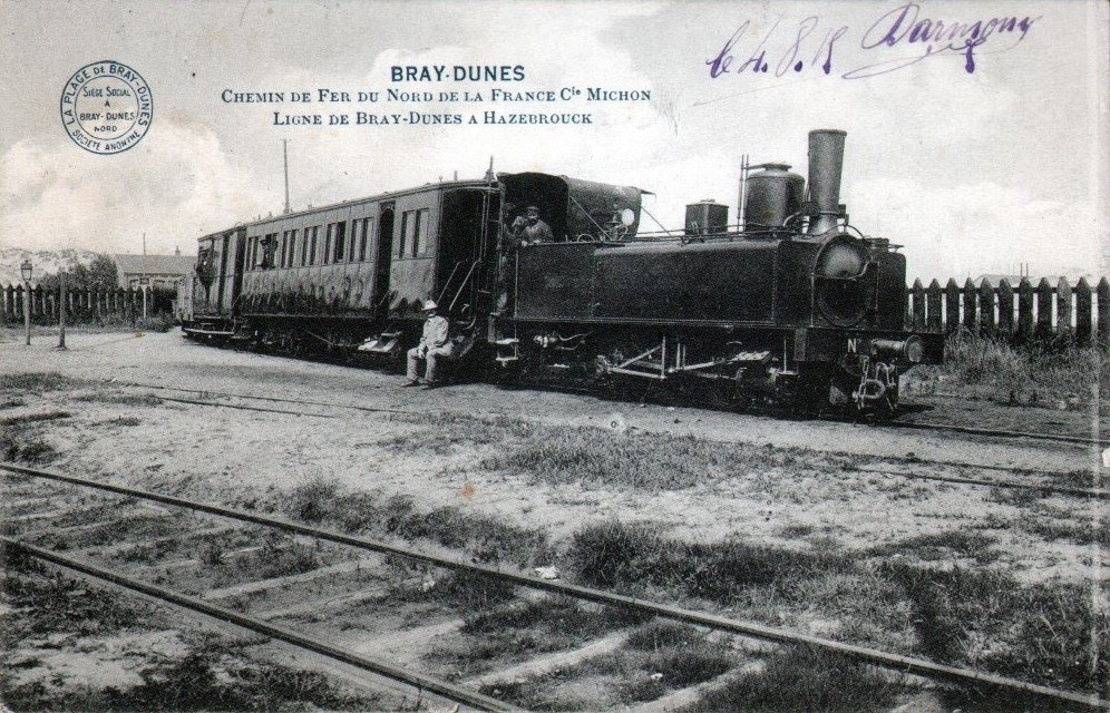 Train du chemin de fer de Hondschoote à Bray-Dunes.